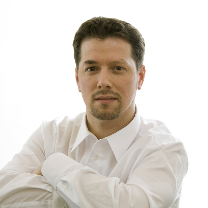 ATD Foto